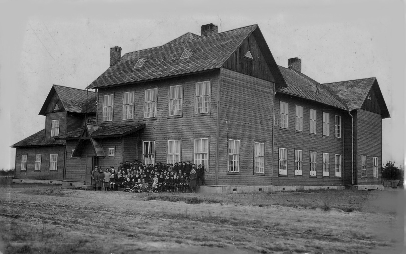 Шестикласская финская школа в деревне Калливере.